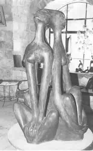 פסל בגלריה